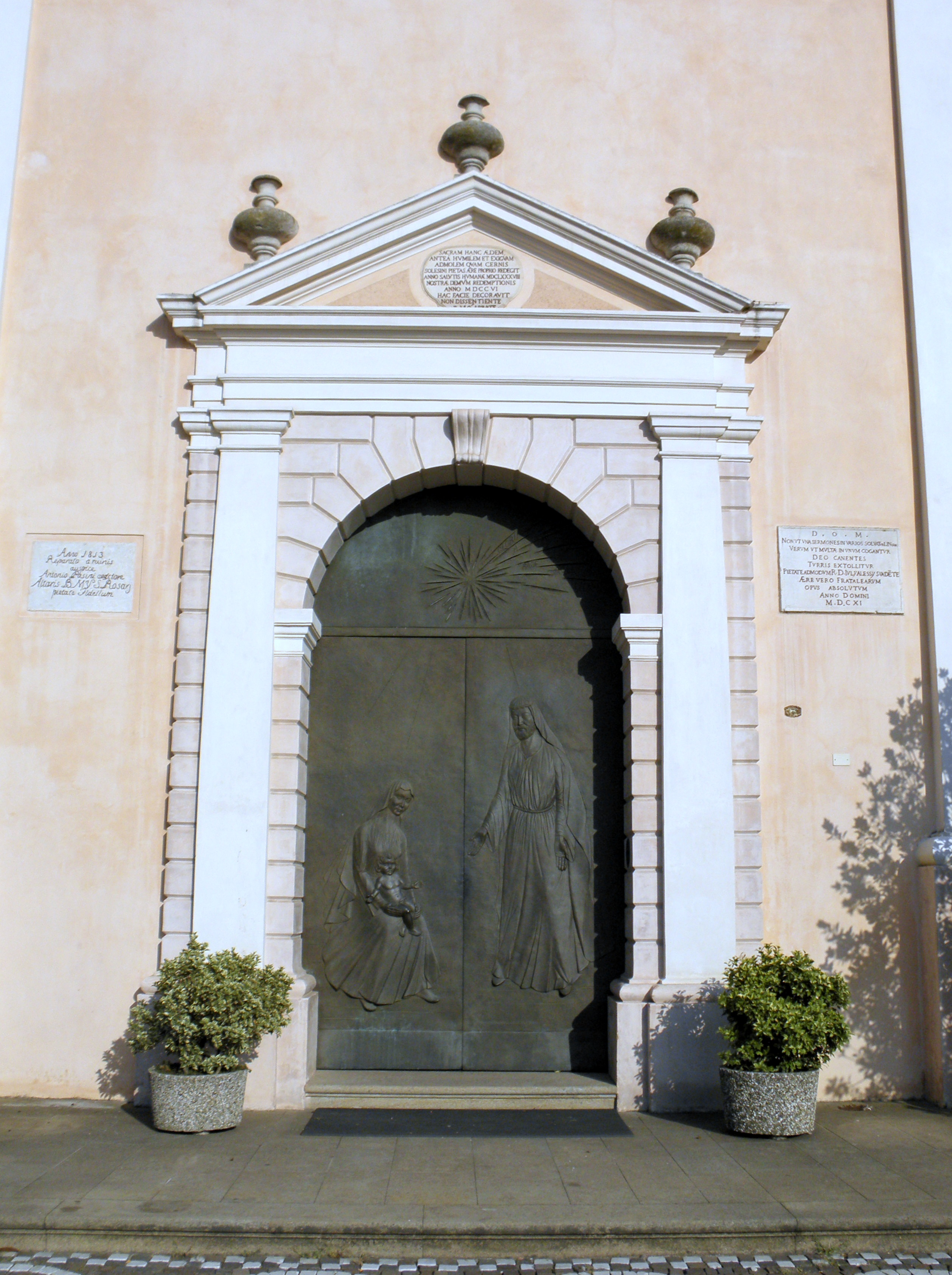 Solesino: il portale della chiesa parrocchiale ed arcipretale di Santa Maria Assunta.